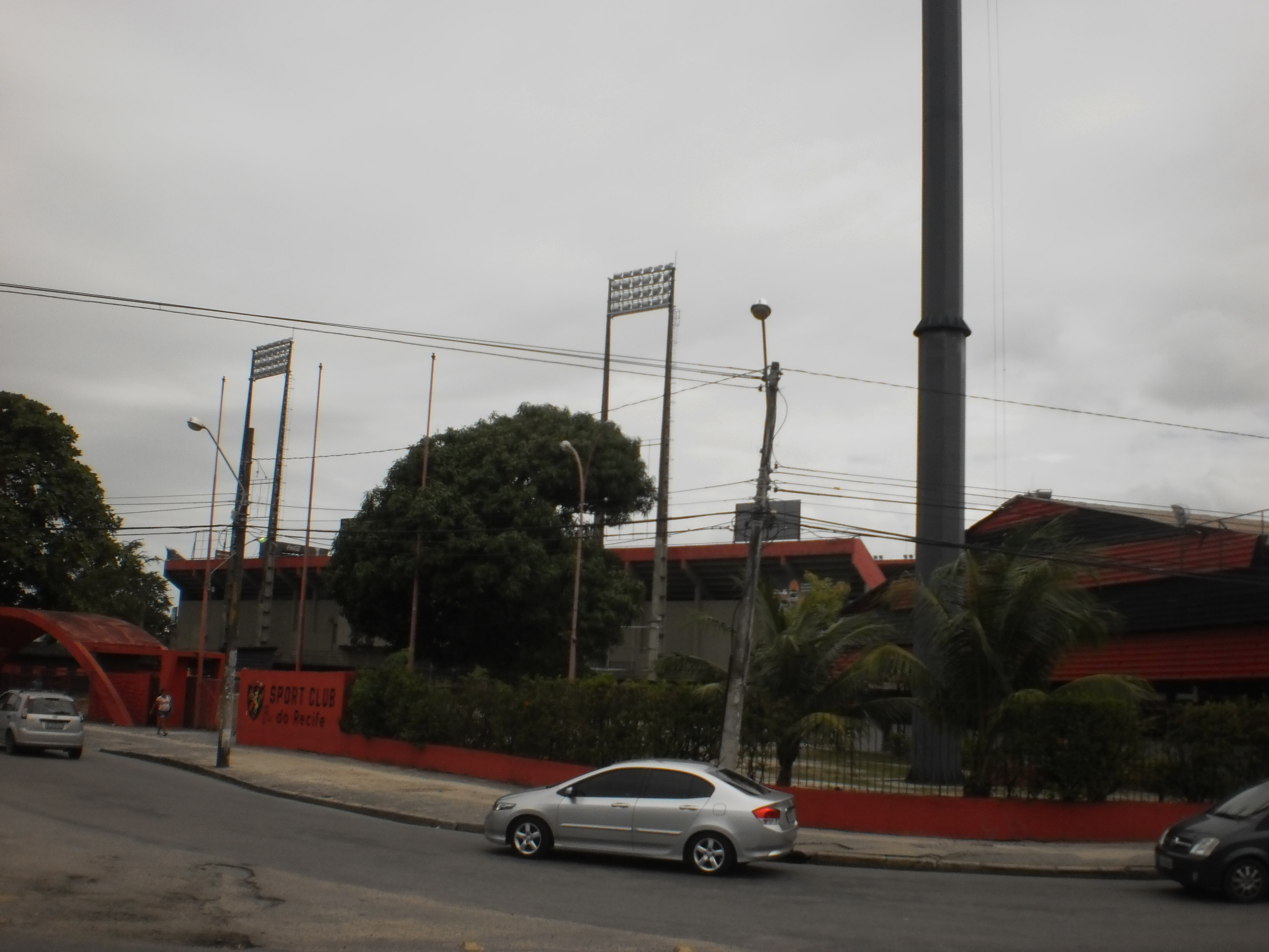 Sport Club Recife - Pernambuco, Brasil.